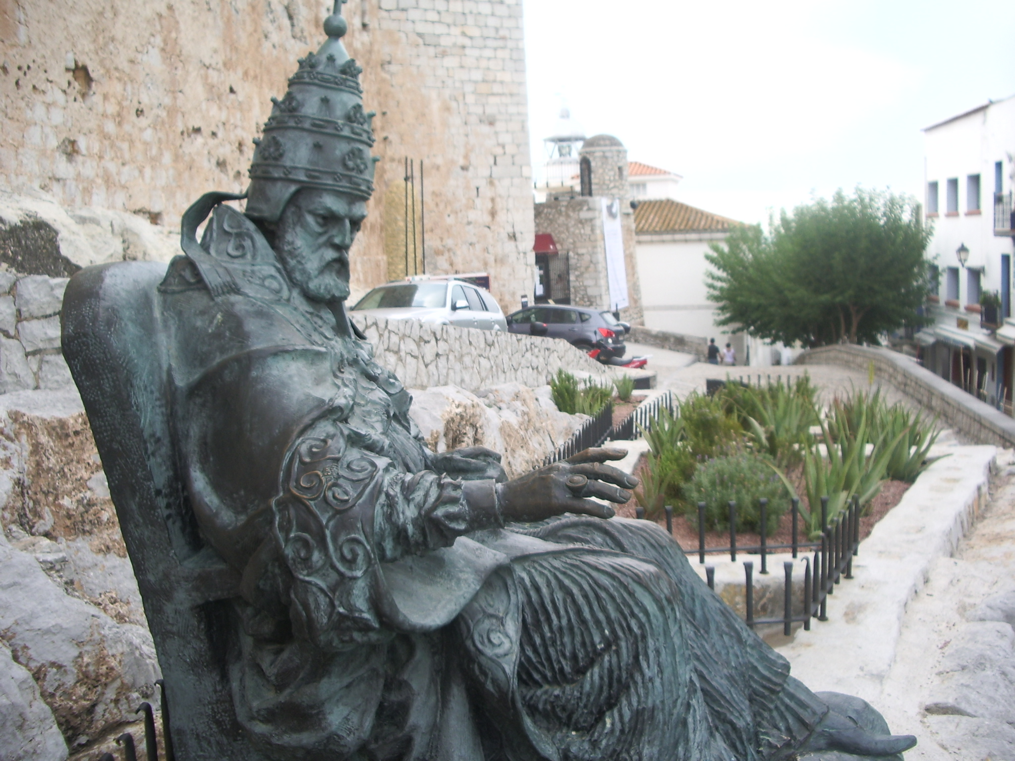 El Papa Luna